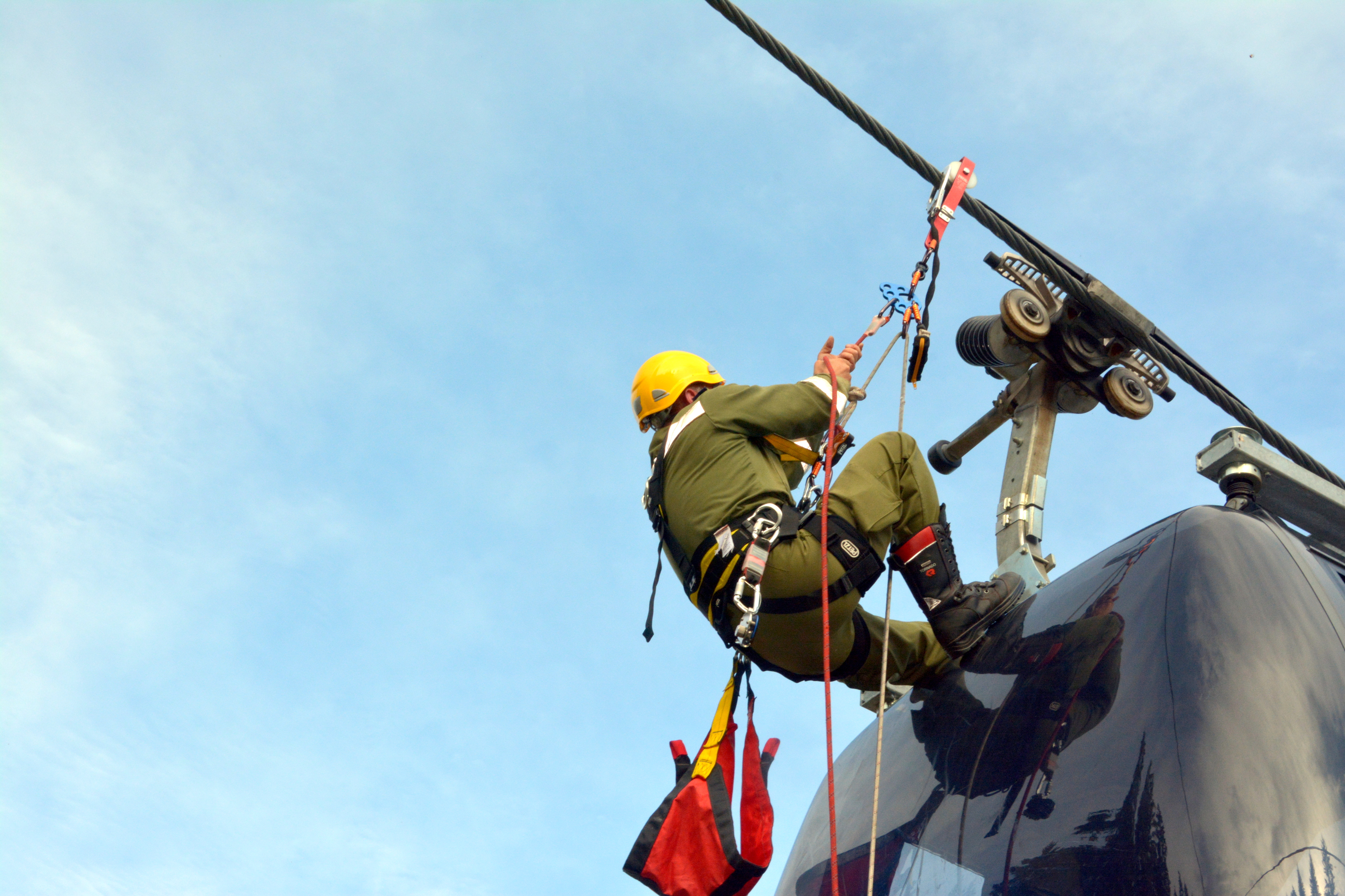 Bergeübung am Sternsteinlift im Mühlviertel